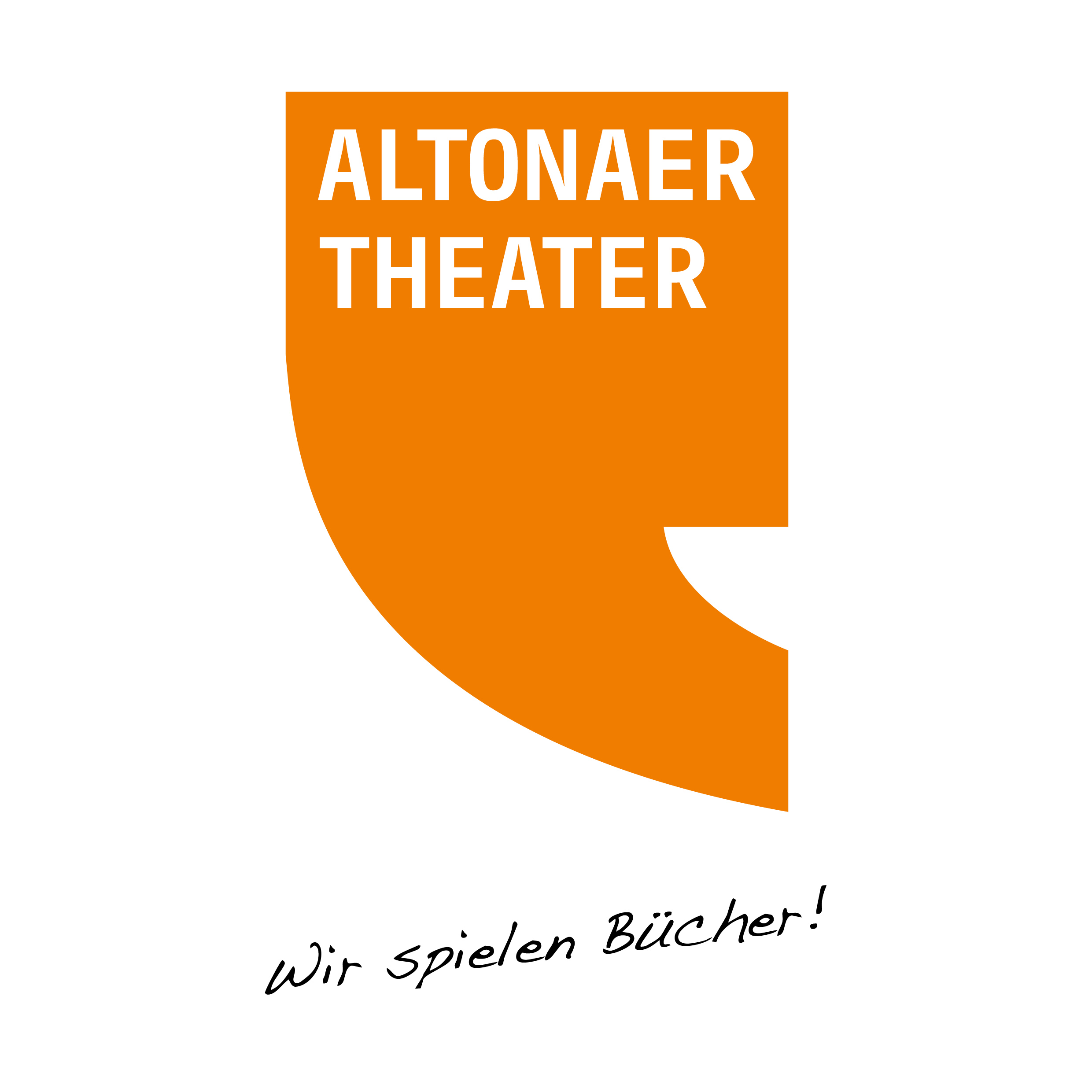 Logo Altonaer Theater